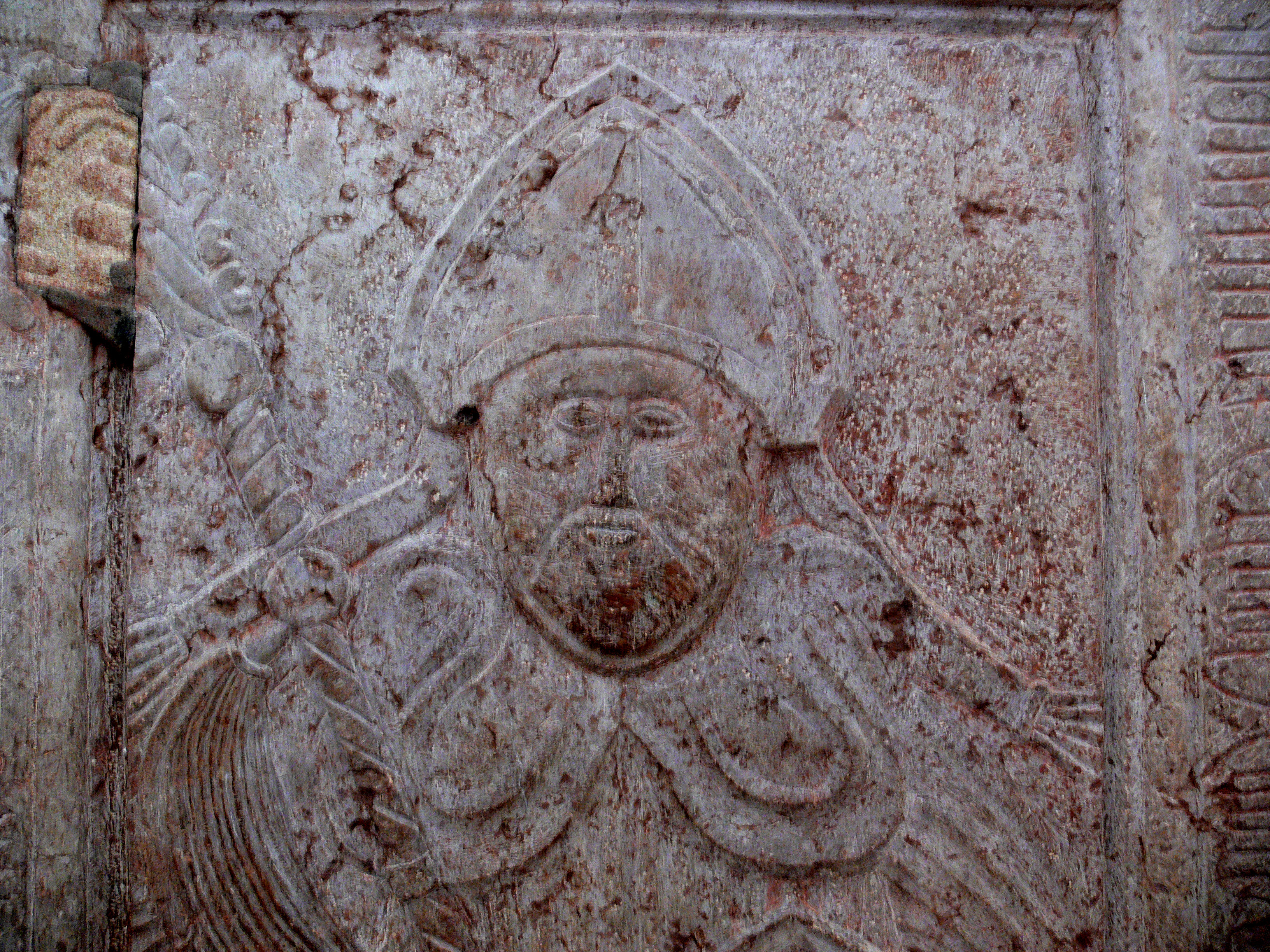 Kloster Blaubeuren, Kapitelsaal: Epitaph Christian Tubingius (Detail), Abt 1545-1562